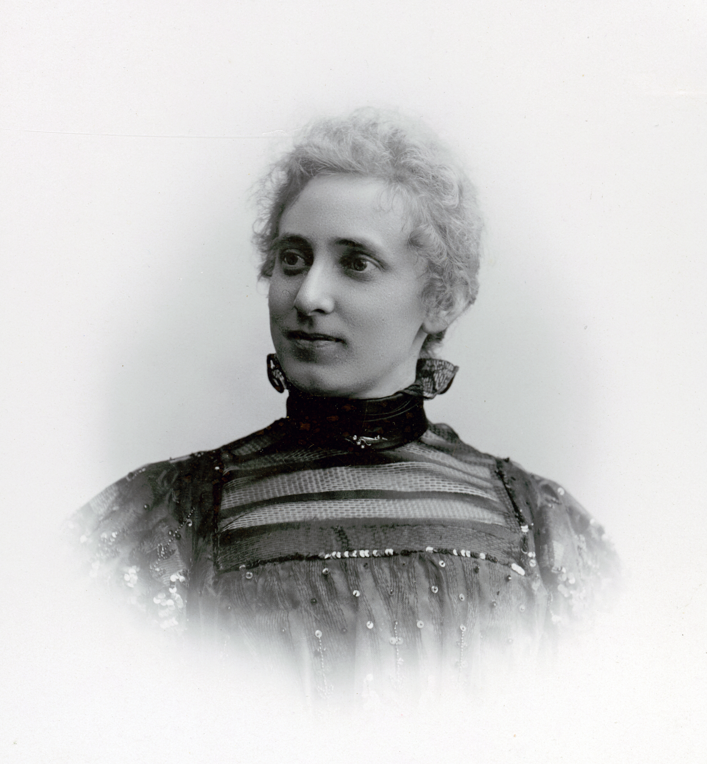 Davida Afzelius, sångare vid Kungliga teatern (Operan) 1900